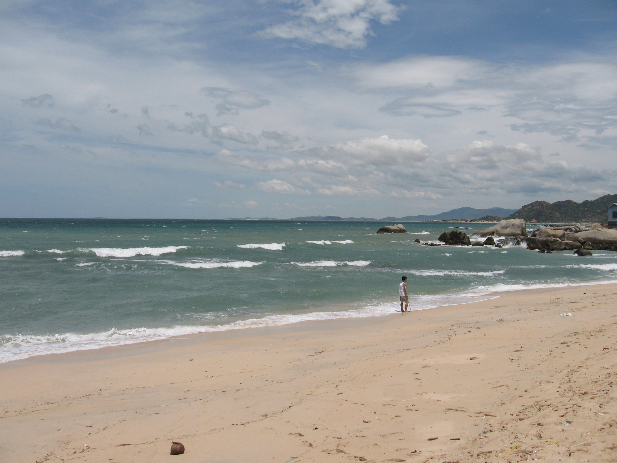 Biển cà Ná - Bình Thuận